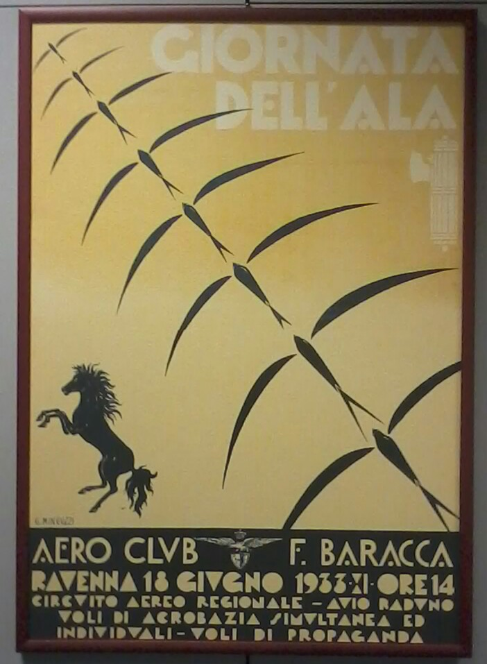 Giornata dell'Ala Ravenna 18 giugno 1933